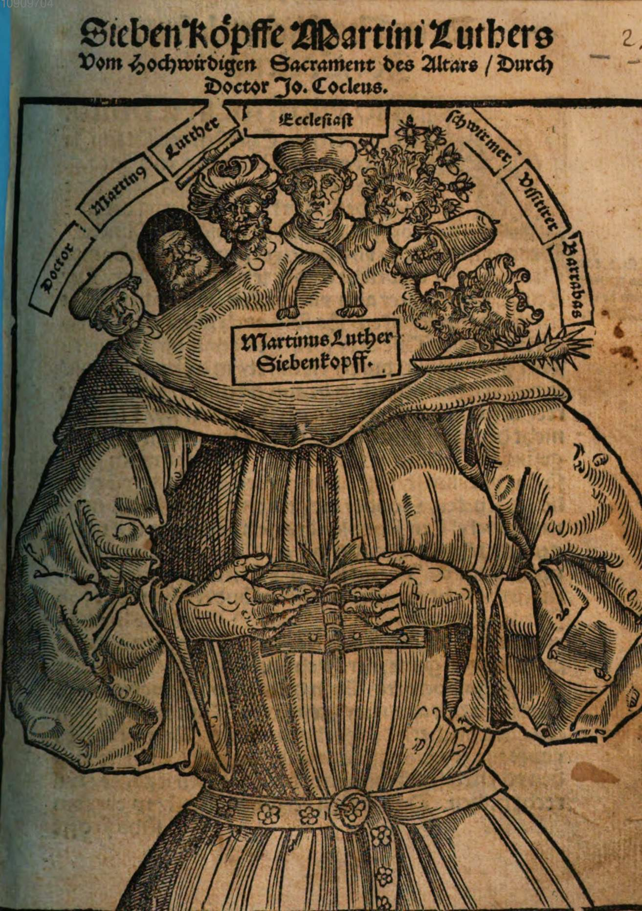 "Siebenköpfiger Luther", Titelbild der Streitschrift von Johannes Cochläus